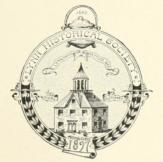 Lynn, Massachusetts, USA